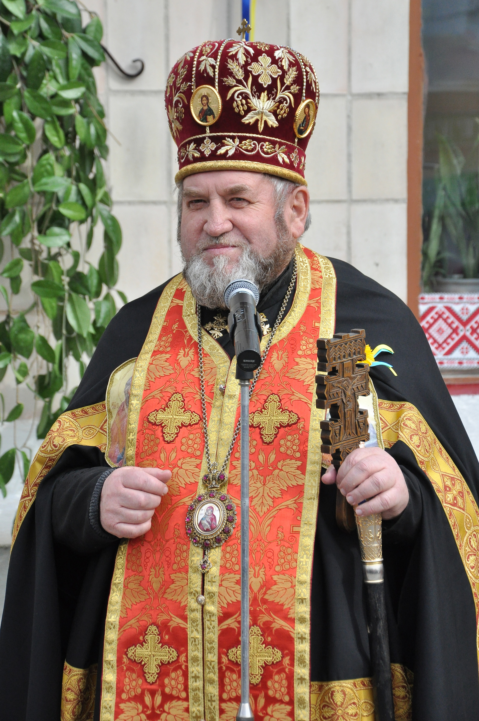 Архієпископ і Митрополит Тернопільсько-Зборівський УГКЦ Василь (Семенюк).